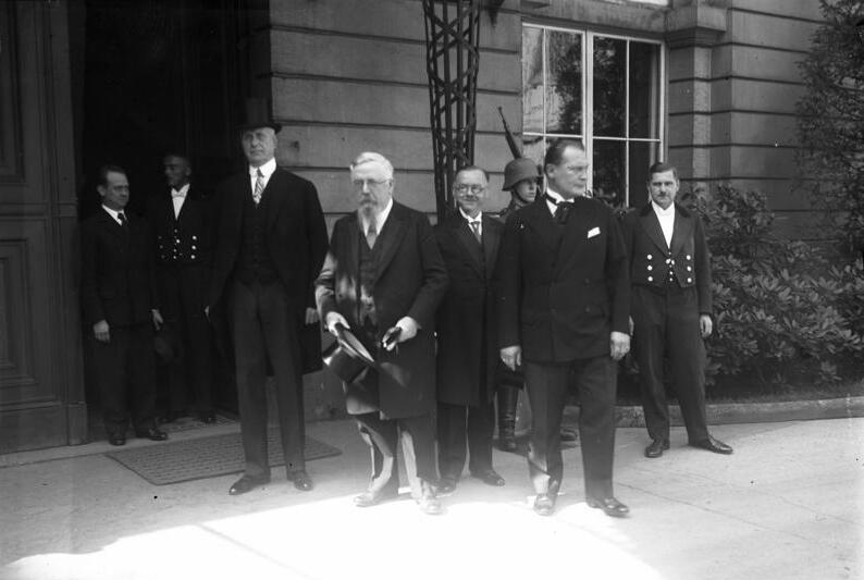 Das neue Präsidium des Reichstags stattet dem Reichspräsidenten seinen Antrittsbesuch ab ! Das Reichstagspräsidium nach seinem Besuch beim Reichspräsidenten von Hindenburg, vorn stehend von links nach rechts: Graef (DNatl.) zweiter Vizepräsident des Reichstags, Esser (Z.) erster Vizepräsident, Rauch (Bayr.Vp.) dritter Vizepräsident und Hauptmann Göring (NSoz.) der Präsident des deutschen Reichstags.